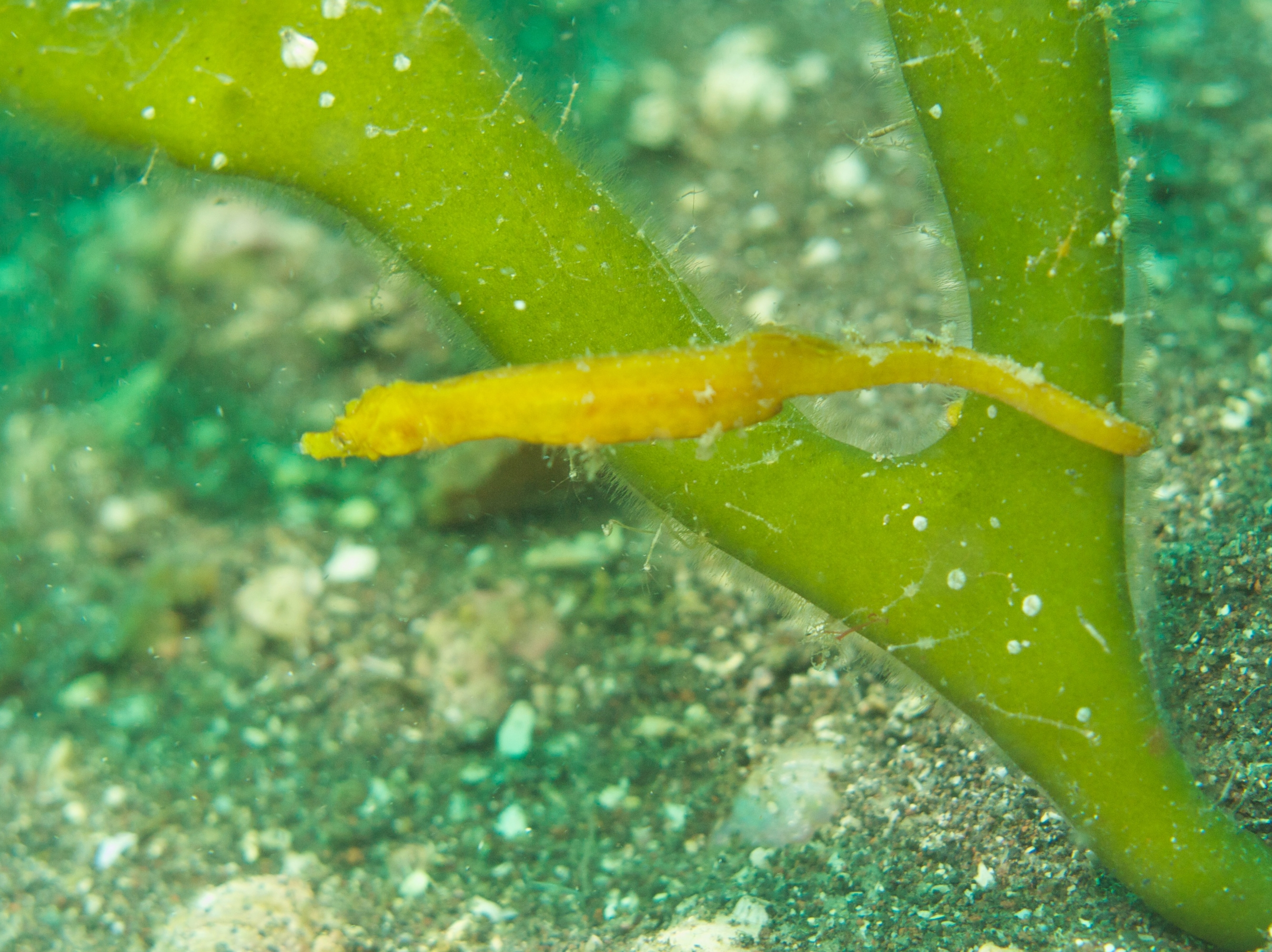 Acentronura gracilissima en Izu, Japón, 2010